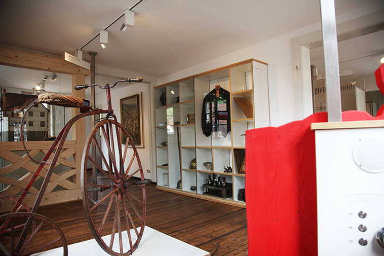 Museum am Markt Arbeitersiedlung